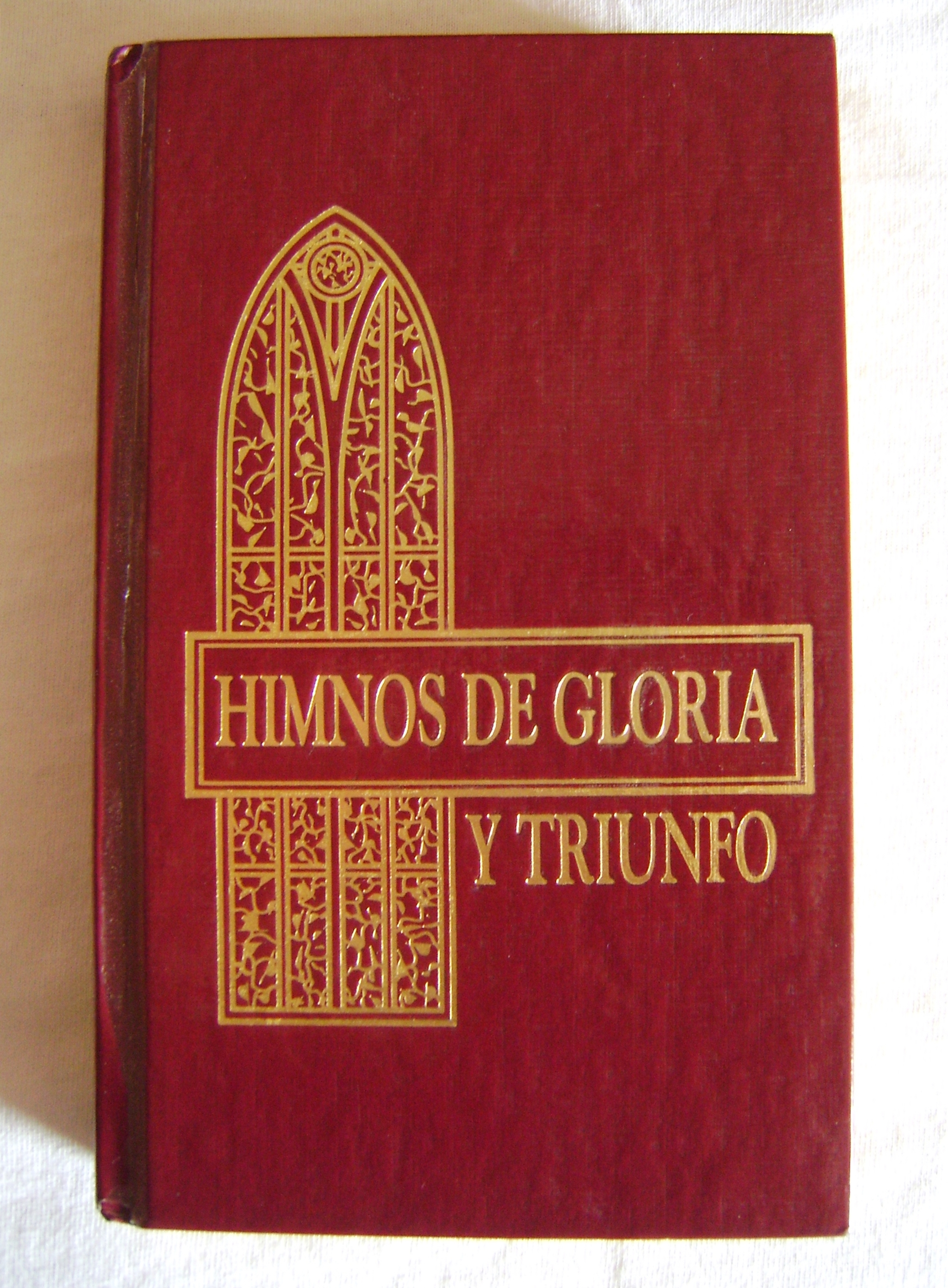 Himnario usado en diversas iglesias pentecostales de habla hispana. Editorial Vida.